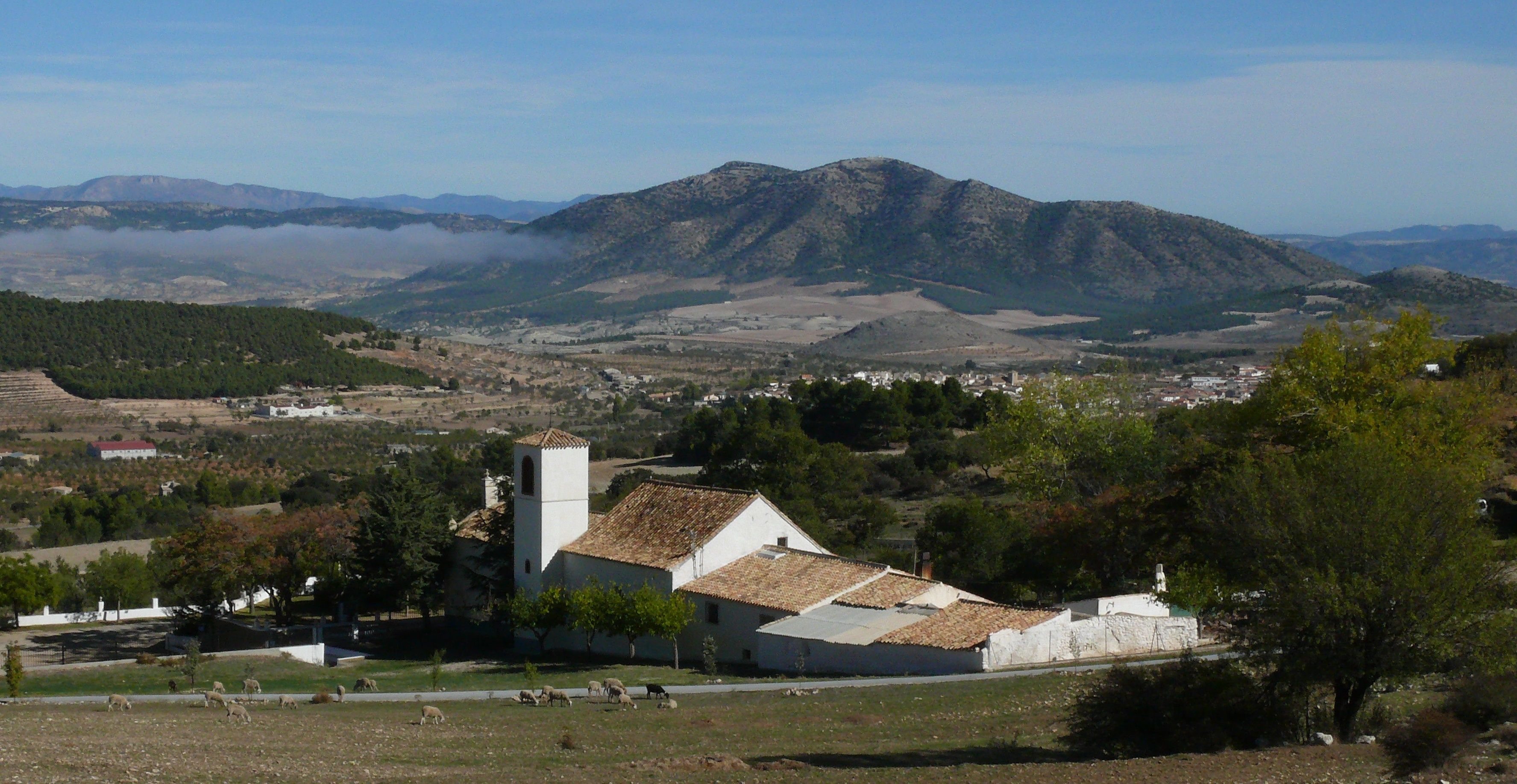 María vom Santuario de la Virgen de la Cabeza in der Sierra de María